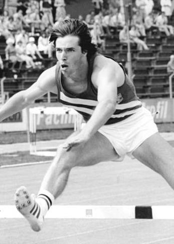 Factual corrections and alternative descriptions are encouraged separately from the original description. Additionally errors can be reported at this page to inform the Bundesarchiv. Original historic description: Volker Beck ADN-ZB Demme 2.8.81 Erfurt:DVfL-Sportfest-Sieger im Hürdenlauf- Auch am zweiten Tag des Sportfestes gab es eine Reihe bemerkenswerter Resultate. Über 400 m Hürden siegte Volker Beck vom SCTF in 49:38.